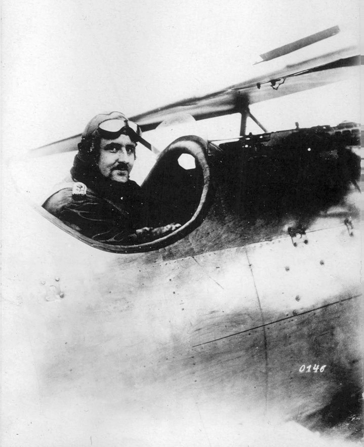 Världskrig 1914–1918. Den kände tyske flygaren ljt. Küppers vilken utmärkt sig genom sina djärva luftfärder till London.